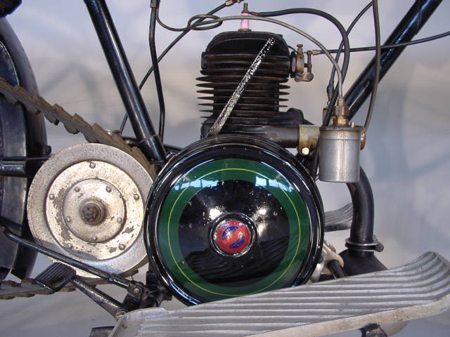 Villiers 300 cc engine from 1926.